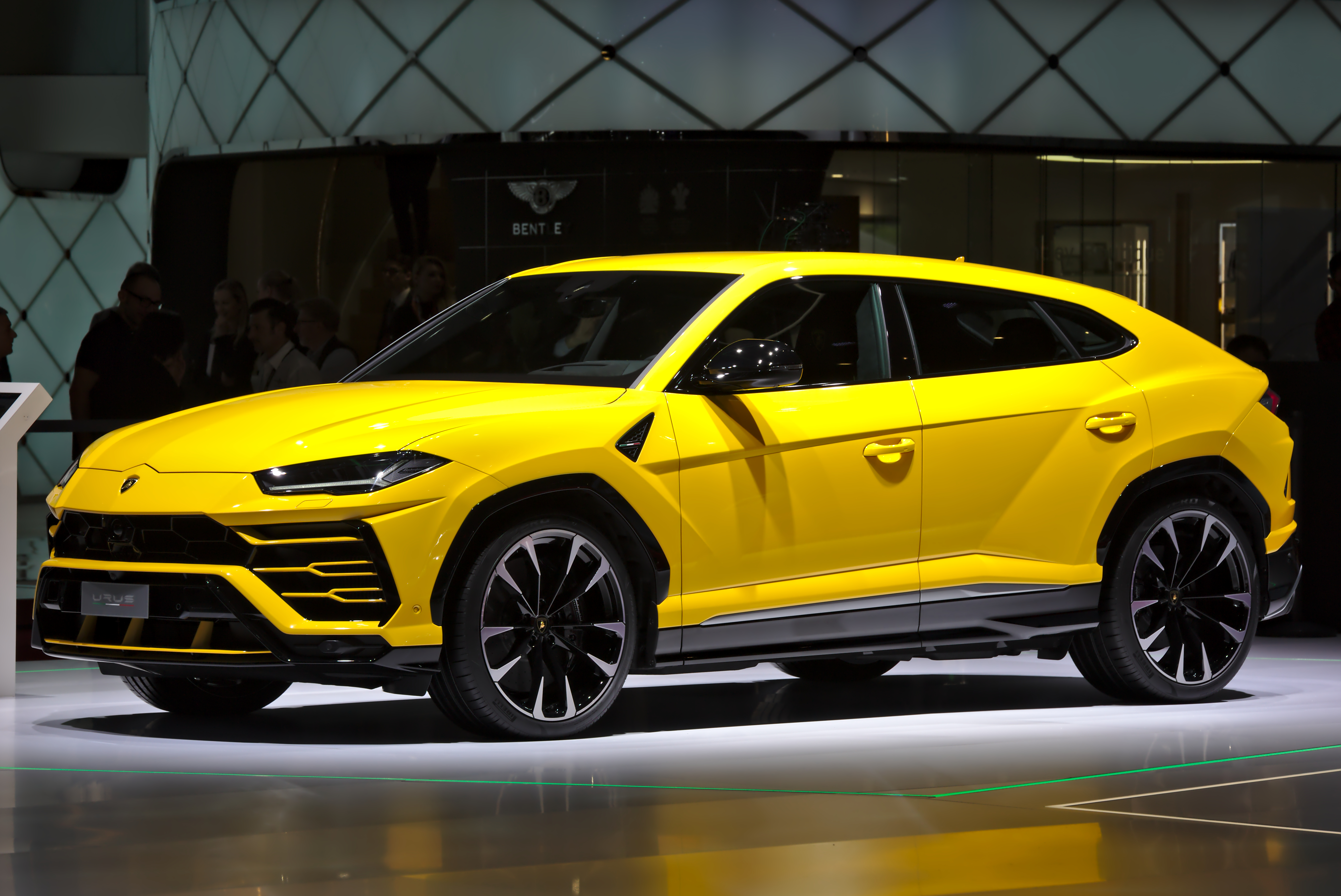 Lamborghini Urus at Geneva Motorshow 2018